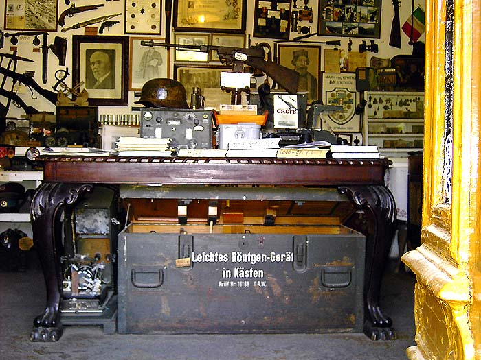 Kriegsmuseum Giorgos Chatzidakis in Kares / Askifou, Crete